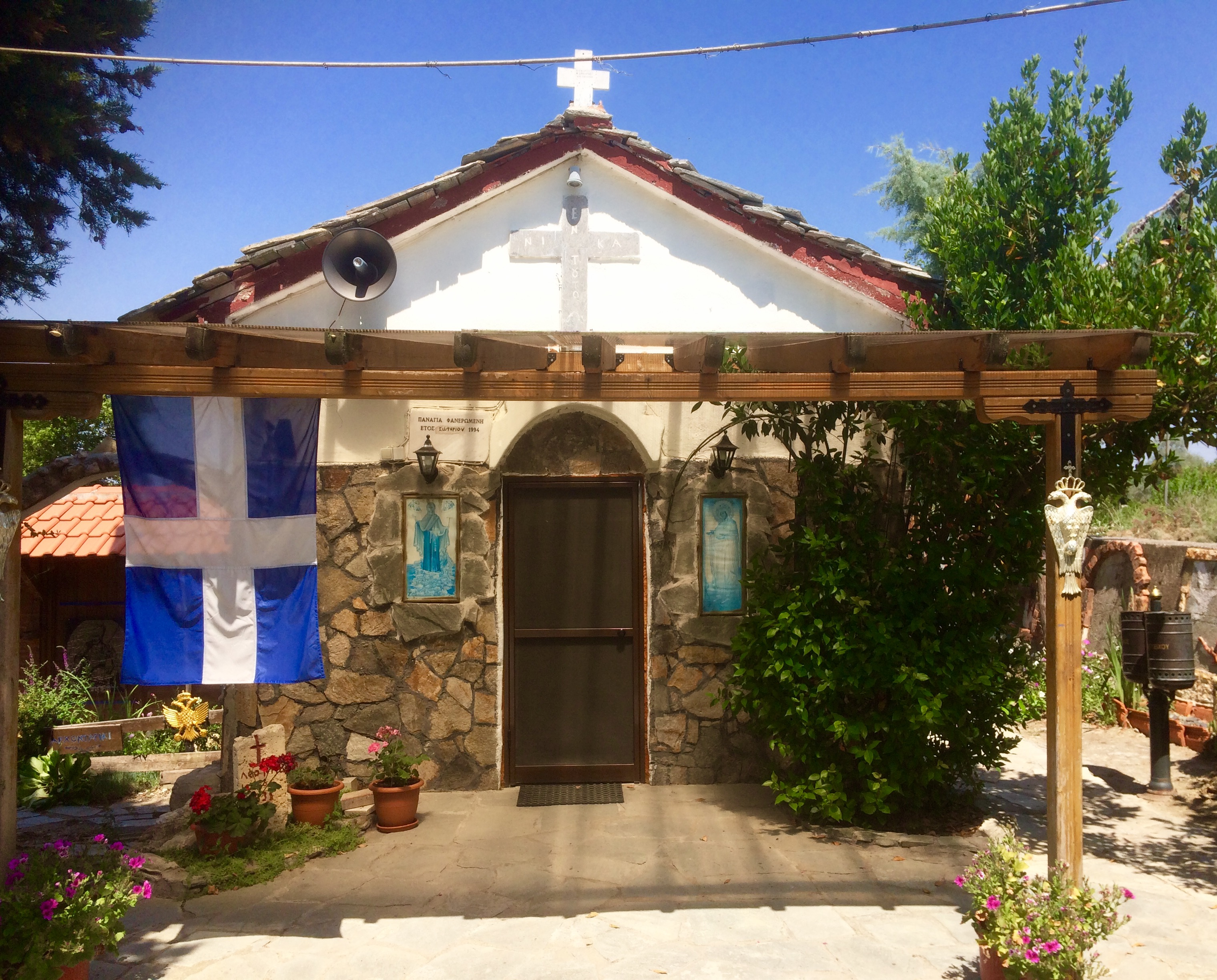 Dei im Jahr 1994 entstandene Kapelle der Jungfrau Maria Sofikiotisa